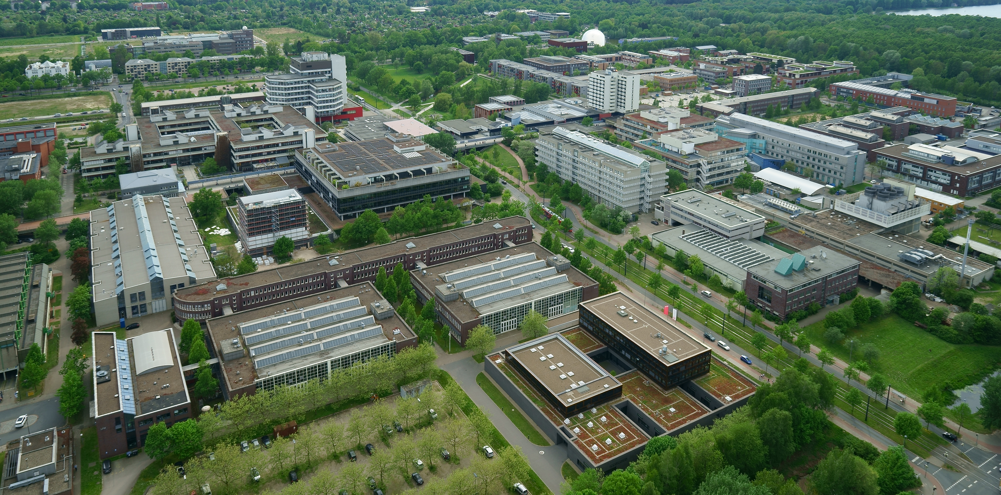 Standort: Fallturm des ZARM in Bremen, Fallturmspitze/Besucherebene (130 Meter): Technologiepark Bremen - Universität Bremen (Zentralbereich, Staats- und Universitätsbibliothek) - BIAS - IWT (vor der Straßenbahnlinie 6) - Stadtwald.